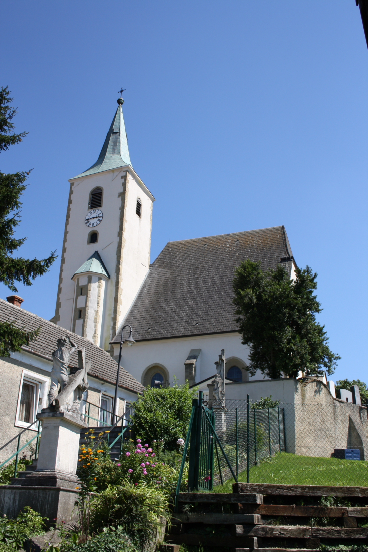 Die Pfarrkirche der niederösterreichischen Gemeinde Tulbing.